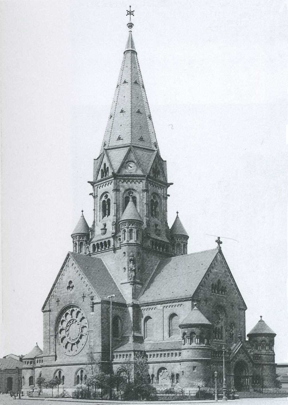 Dresden, Wettiner Platz, evangelisch-lutherische Jakobikirche, erbaut 1897-1901 nach Entwurf von Jürgen Kröger, 1945 schwere Kriegsschäden, Ruine 1953 gesprengt